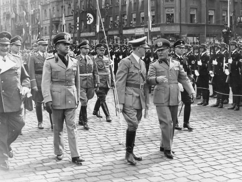 Scherl: Historische Stunden in München Heute begannen in München die Besprechungen des Führers mit den führenden Staatsmännern Europas über das Schicksal des sudetendeutschen Landes. UBz: den Führer und der italienische Regierungschef Benito Mussolini kurz nach dem Verlassen des Münchener Hauptbahnhofs. Hinter dem Führer der italienische Aussenminister Graf Ciano und Generalfeldmarschall Hermann Göring. 29.9.1938 12861-38